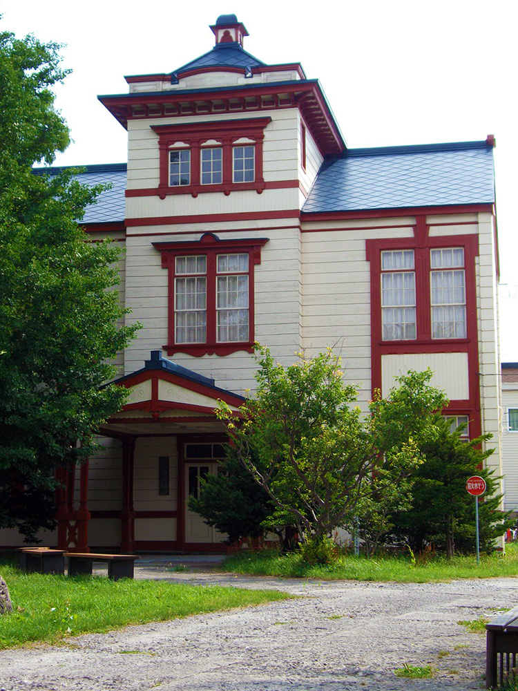 北海道教育大学函館校北方教育資料館。大正3年（1914年）、函館師範学校校舎として竣工。国登録有形文化財 第01-0022号。